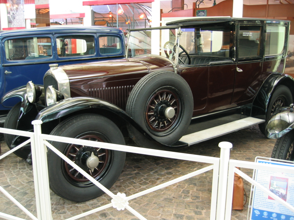 Peugeot Type 176 - Musée Peugeot Sochaux